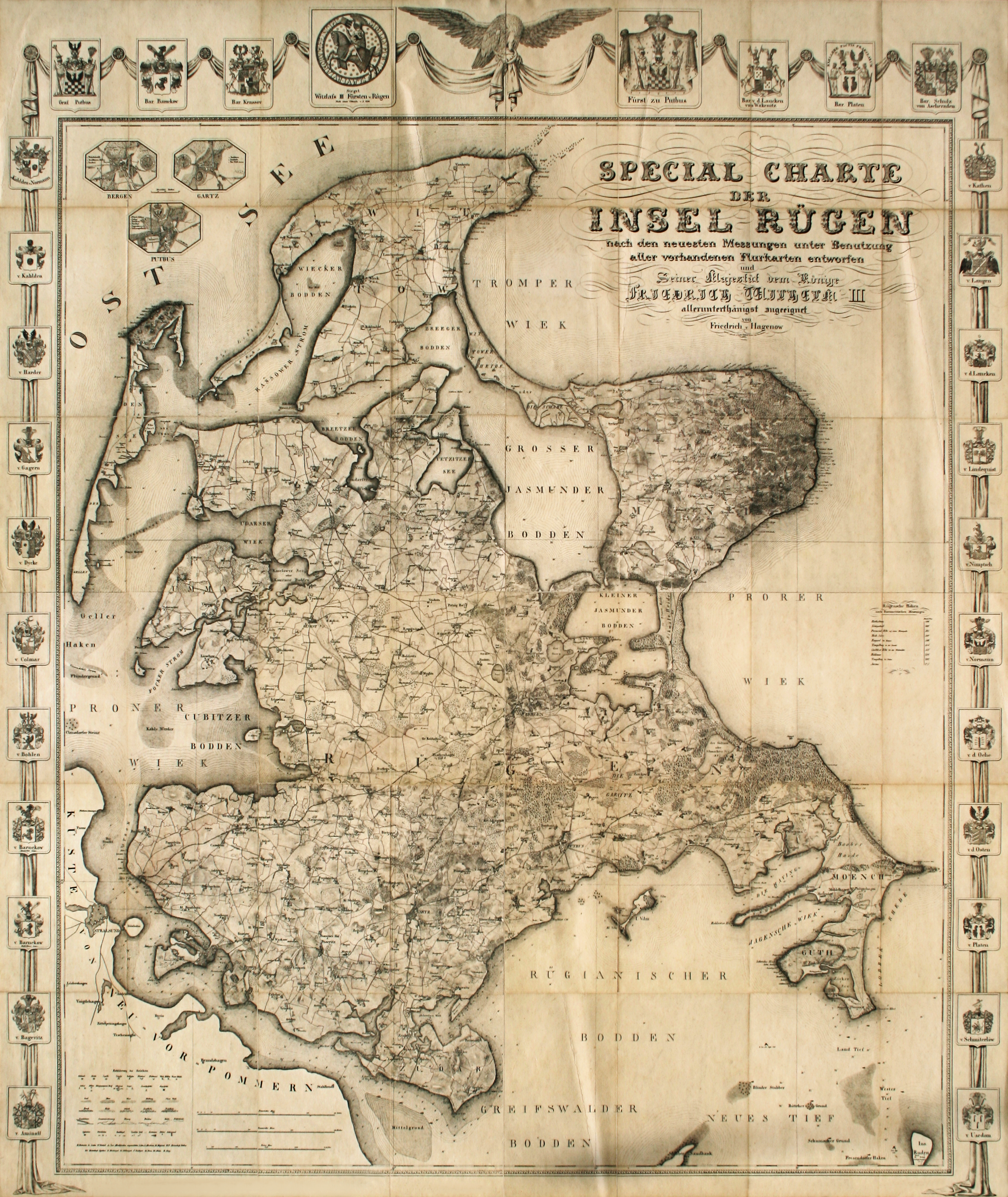 Die Special Charte der Insel Rügen ist die erste Gesamtkarte der Insel Rügen, die die topografischen und geografischen Gegebenheiten präzis darstellt. (retuschiert)